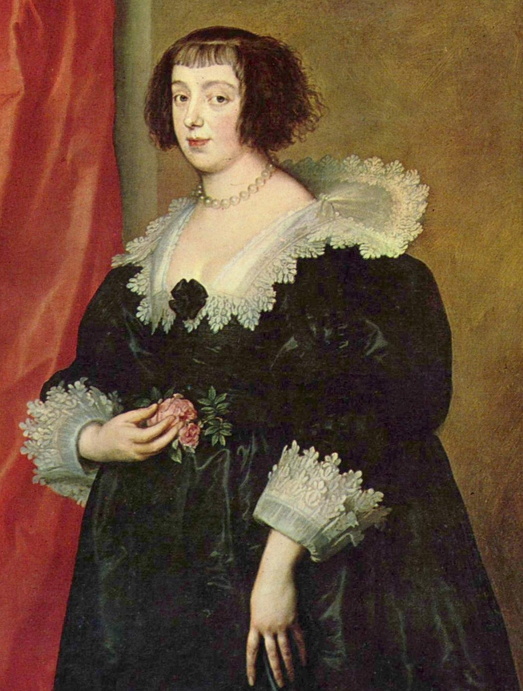 Portrait de Marguerite de Lorrainetitle QS:P1476,fr:"Portrait de Marguerite de Lorraine" label QS:Lfr,"Portrait de Marguerite de Lorraine" detail